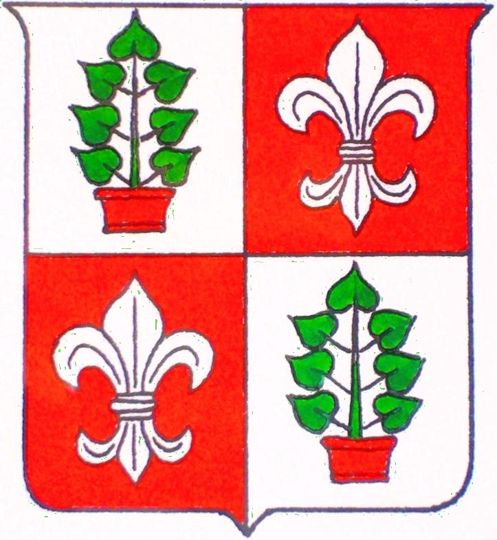 Wappen Kehrli von Utzenstorf, nach einer Vorlage im Staatsarchiv Bern